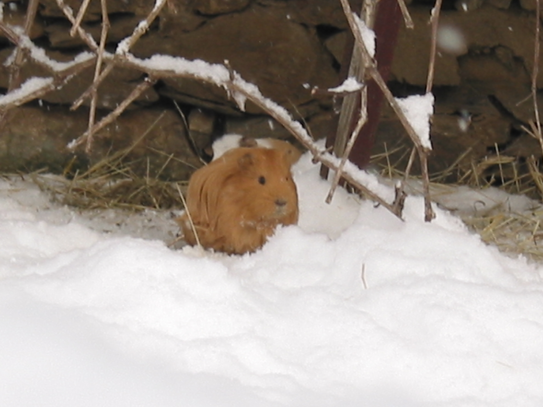 Meerschweinchen „Maximilian“ (Cavia porcellus) im Schnee Own picture, made bei Christina Scholz (= Murx Pickwick)